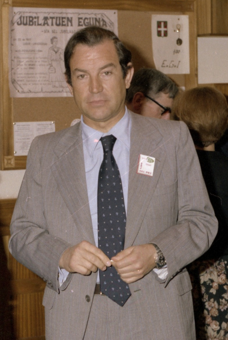 Carlos Garaikoetxea en la inauguración del batzoki de Oñate (13 de mayo de 1979)